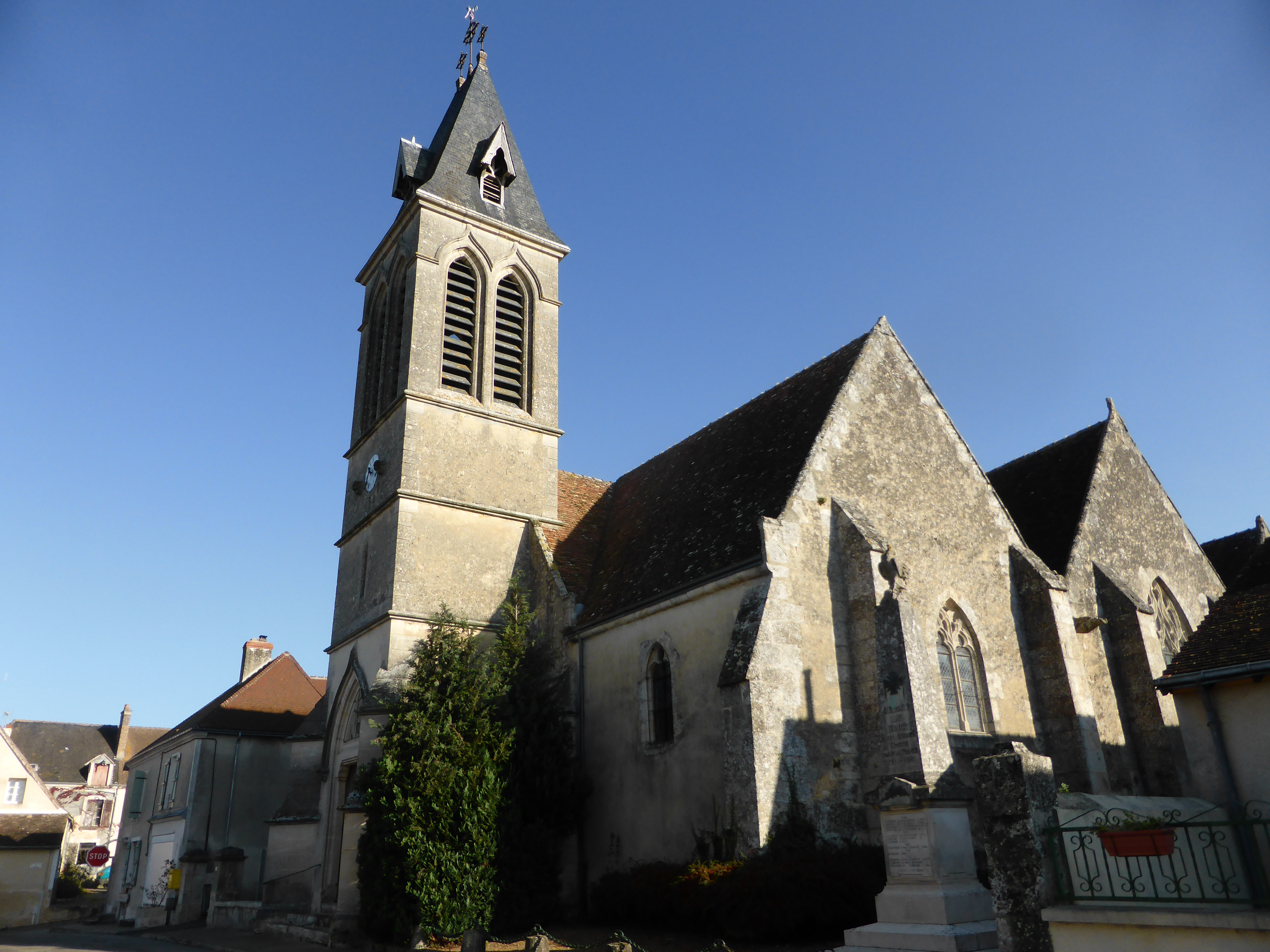 Église Saint-Pierre d'Origny-le-Roux, dans l'Orne, en France.